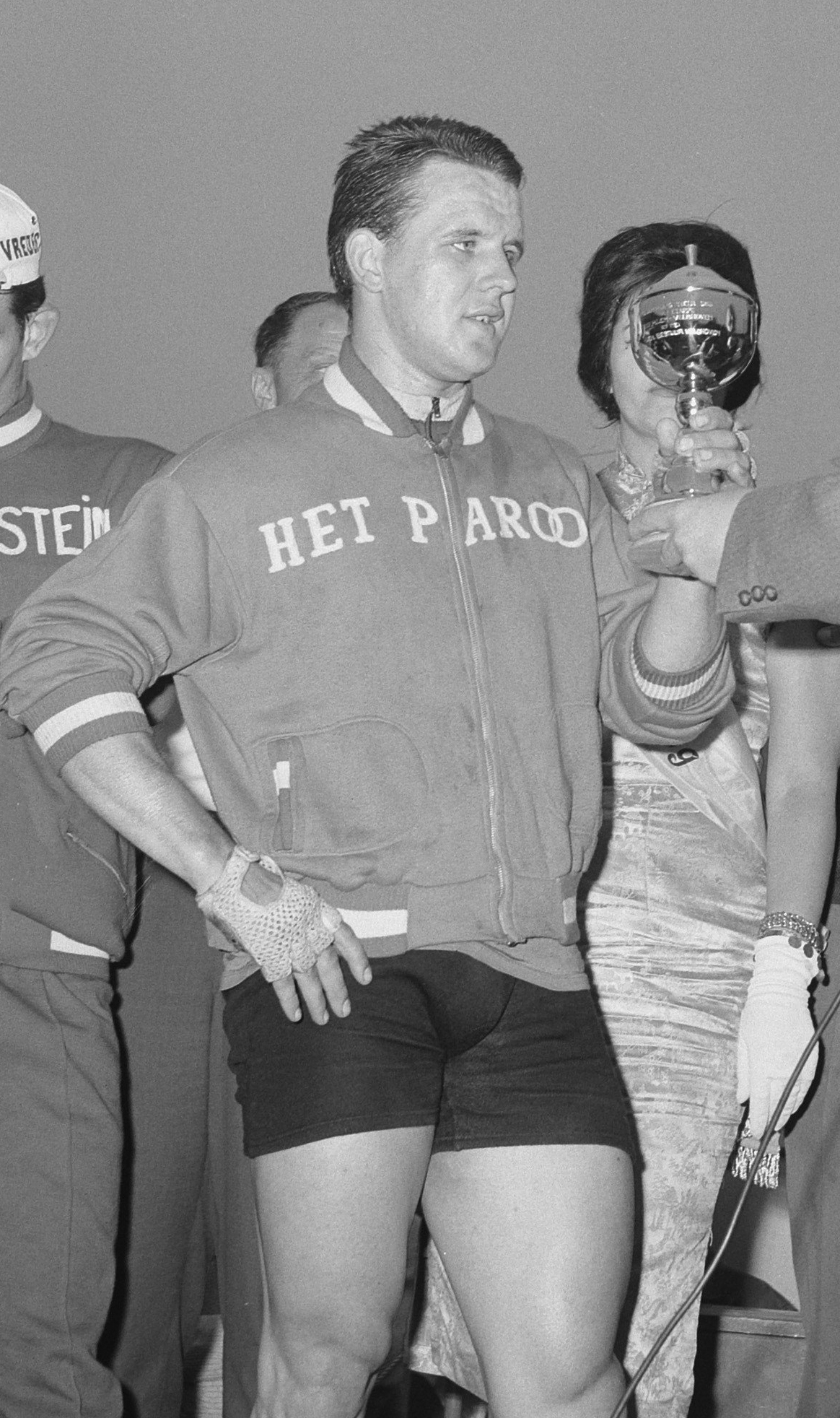 Olympia Tour 4e etappe van Heerlen naar Veldhoven. M. Paul